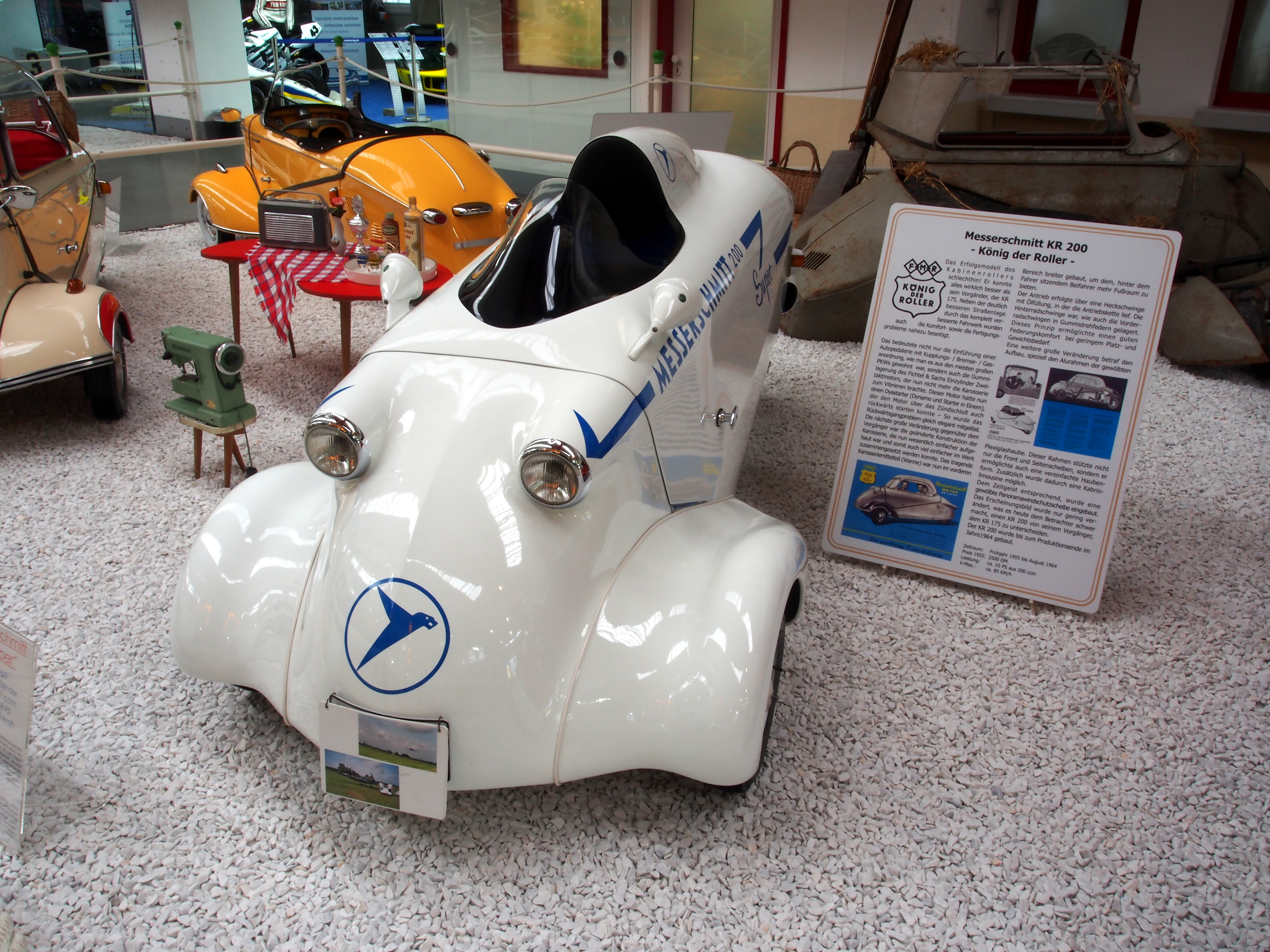 FMR Messerschmitt KR 200 'Super'